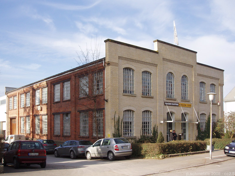 Gebäude Kaffee-Hagen in der Christophstraße 13 in Heilbronn